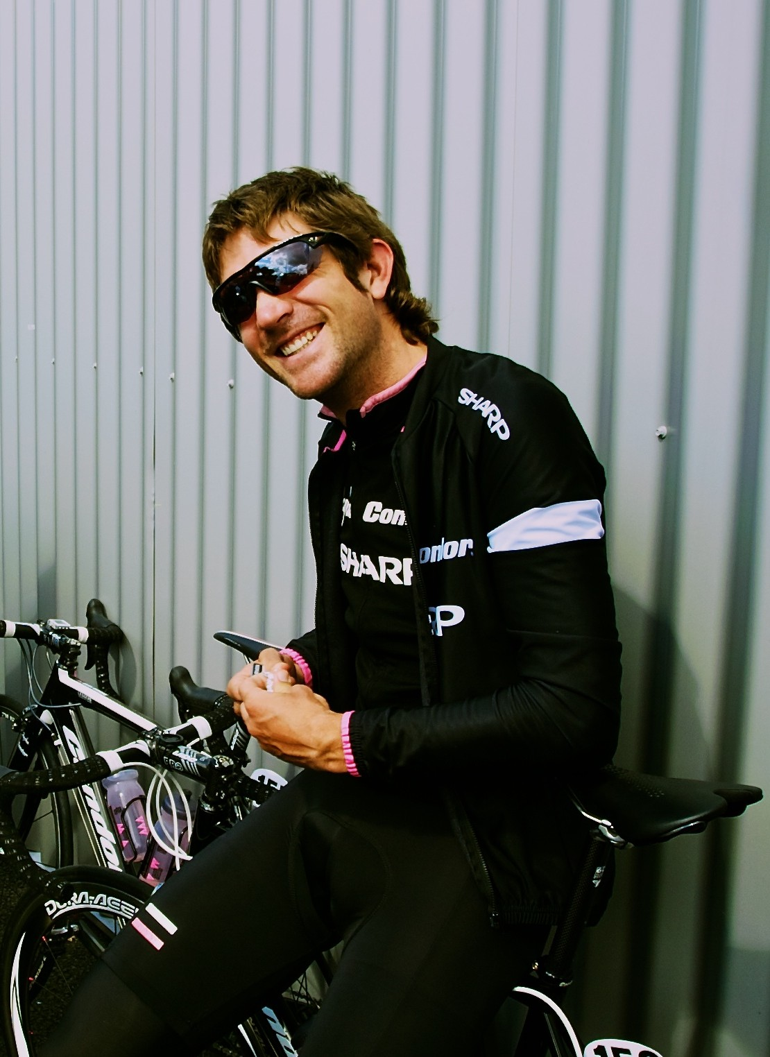 Image (recadrée) du cycliste namibien Dan Craven en 2010. Camera: Nikon D700 License on Flickr (2012-01-14): CC-BY-2.0 Flickr tags: darren lapthorne, dan craven, cycling